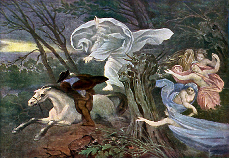 Erlköniglabel QS:Lde,"Erlkönig"